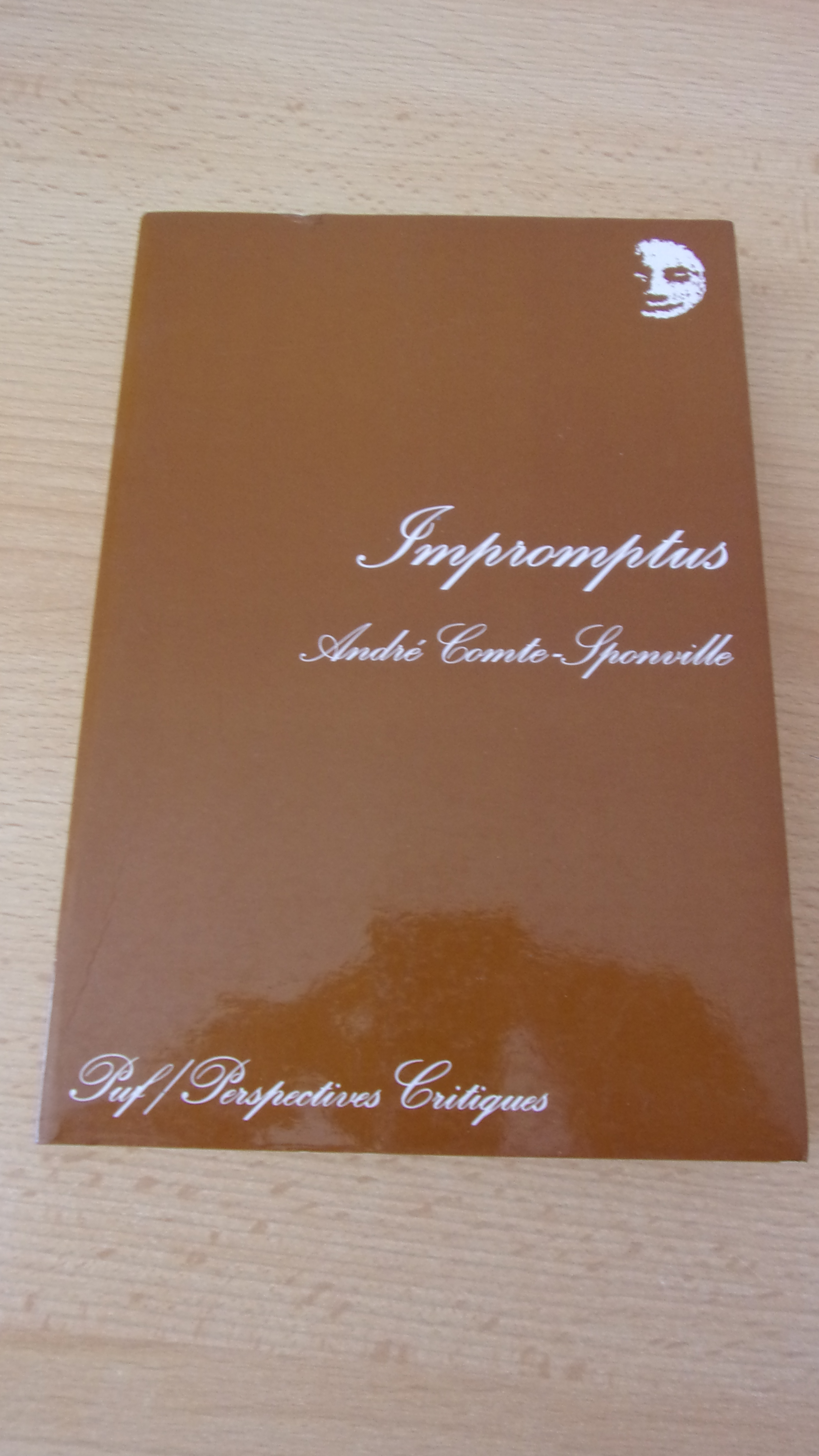 Impromptus - André Comte-Sponville